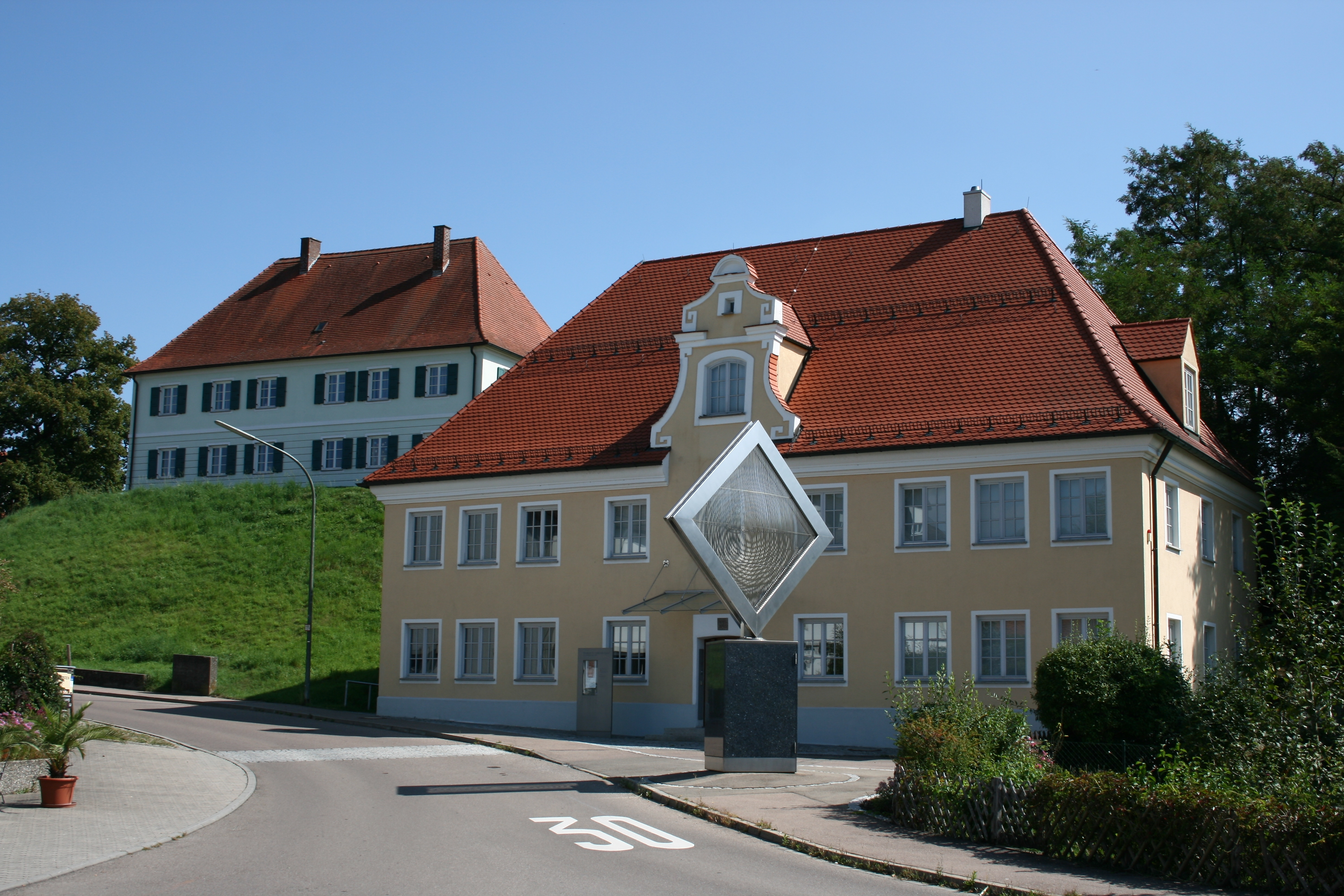 Im ehemaligen Bräuhaus Oberfahlheim ist die Kunstsammlung des Landkreises Neu-Ulm untergebracht.